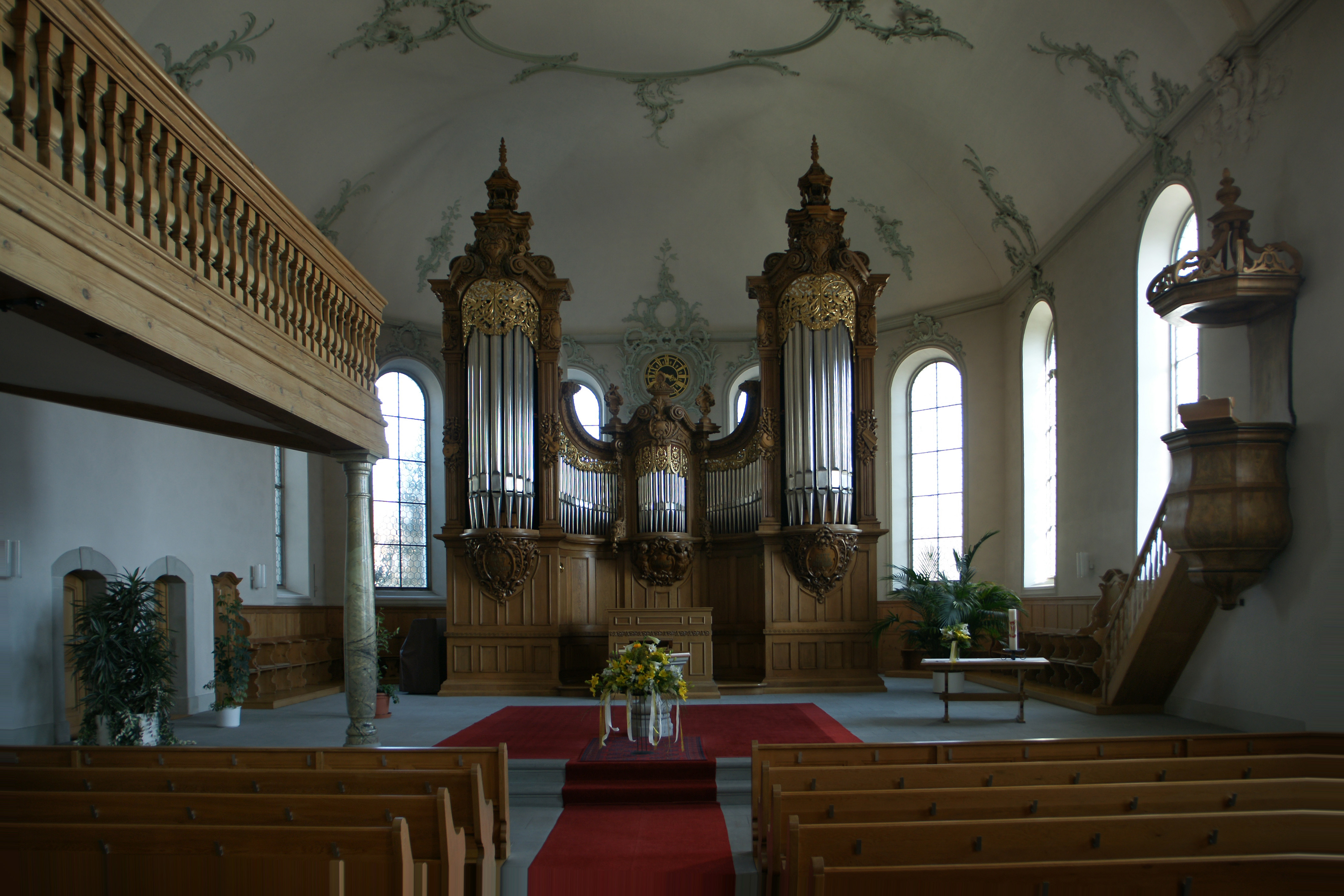 Evangelisch reformierten Kirche am Dorfplatz in Gais.